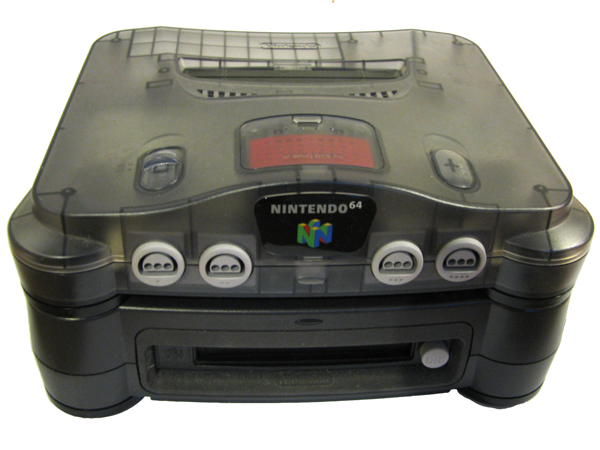 Nintendo 64DD unit docked under a japanese Nintendo 64.